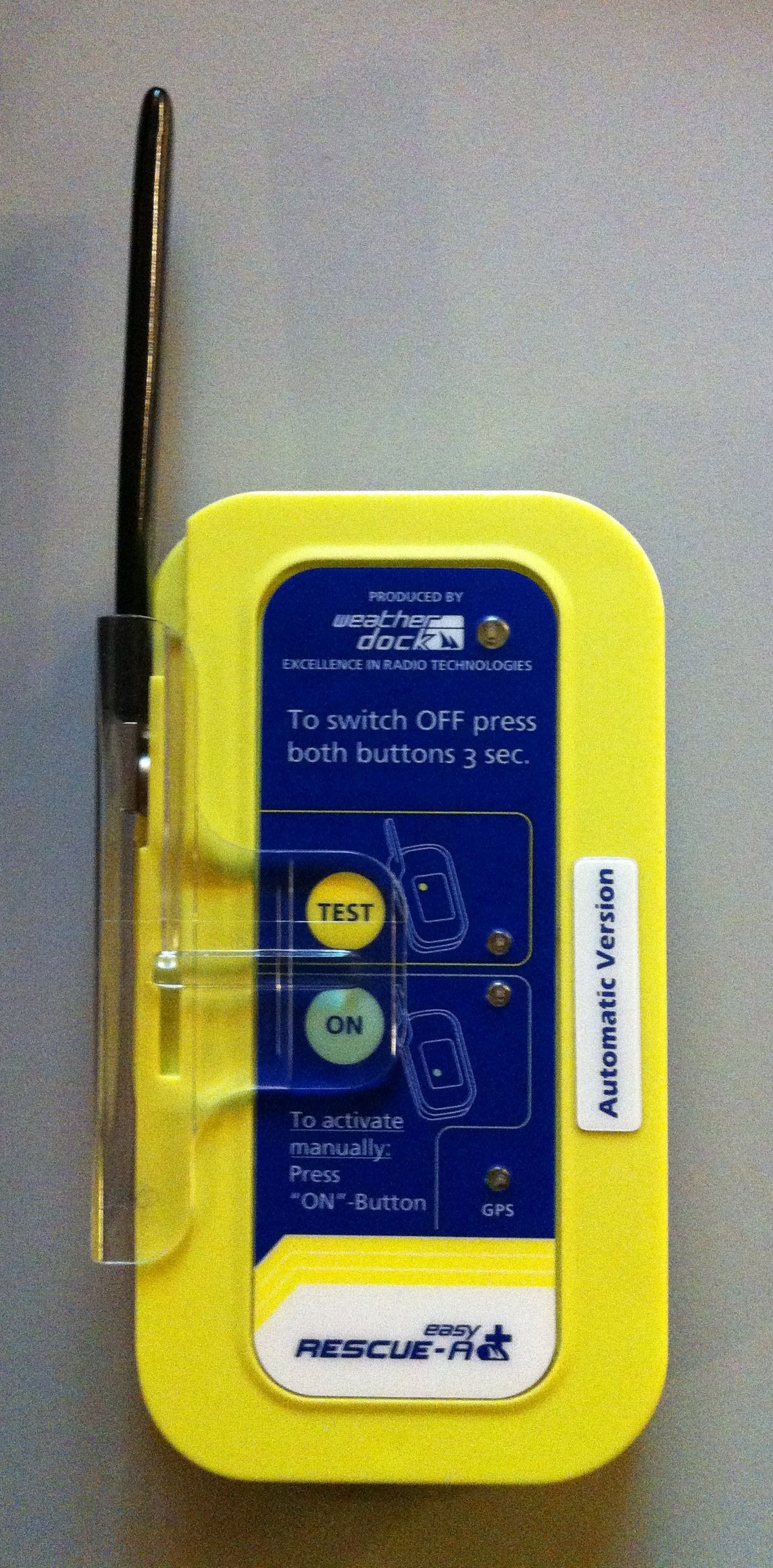 SART AIS transponders.